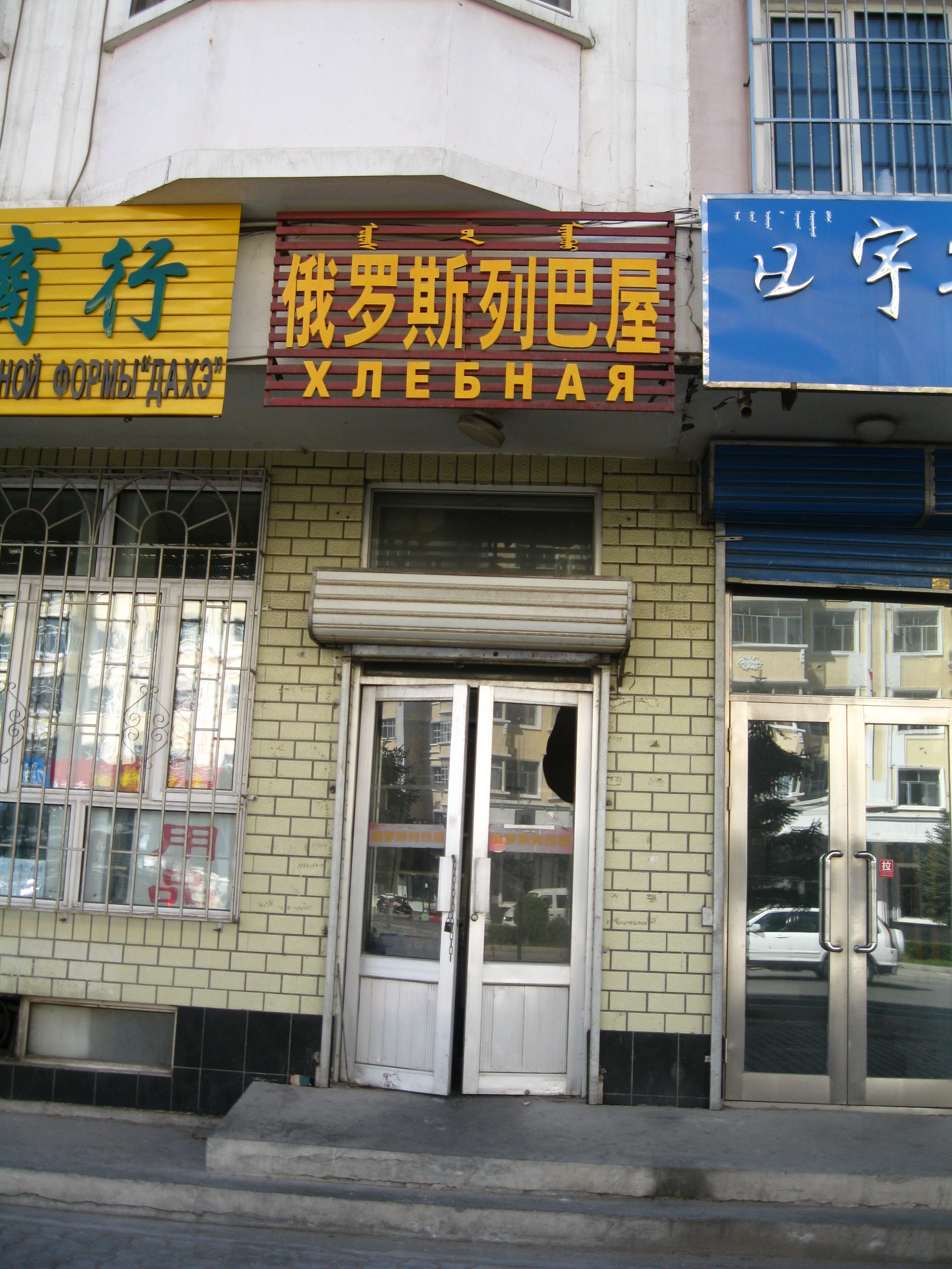 Трёхъязычная вывеска (монгольский, китайский, русский) на магазине в Маньчжурии, Внутренняя Монголия, Китай